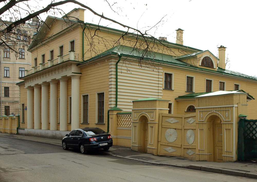 Denezhny lane, Moscow.